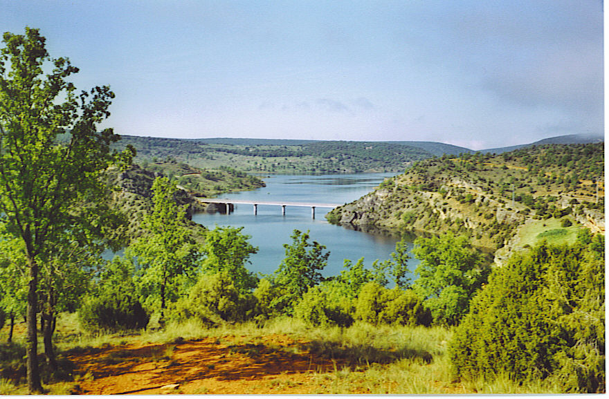 Embalse de La Tajera, rio Tajuña, en Torrecuadrada de los Valles, Guadalajara, comunidad de Castilla-La Mancha, España